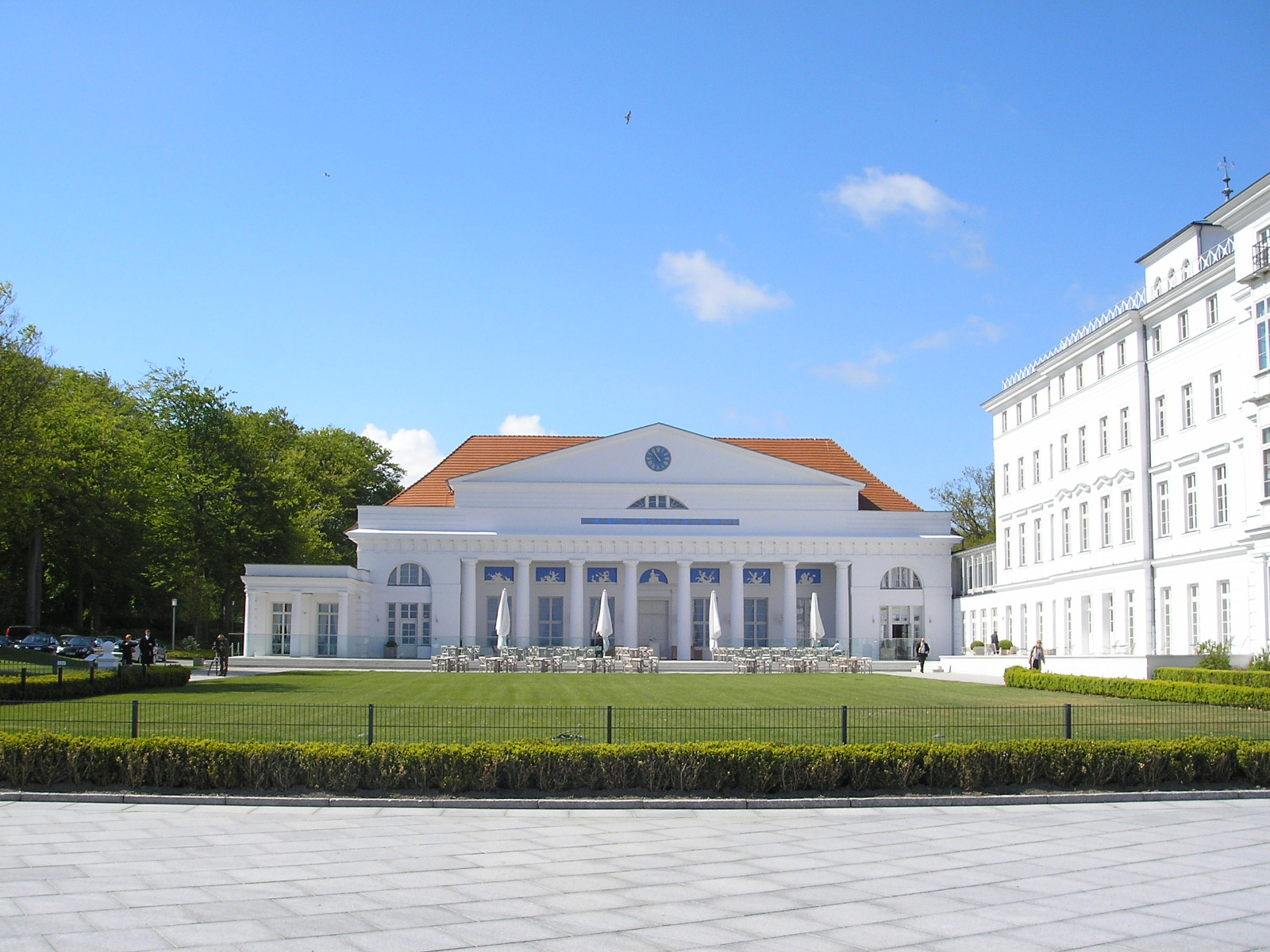 View of the Kurhaus in Heiligendamm.